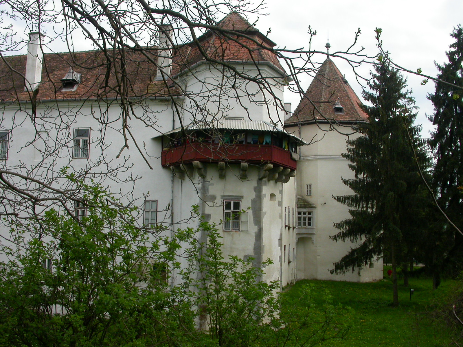 Ansamblul castelului Kendy-Kemeny, sec. XVI, sec. XIX